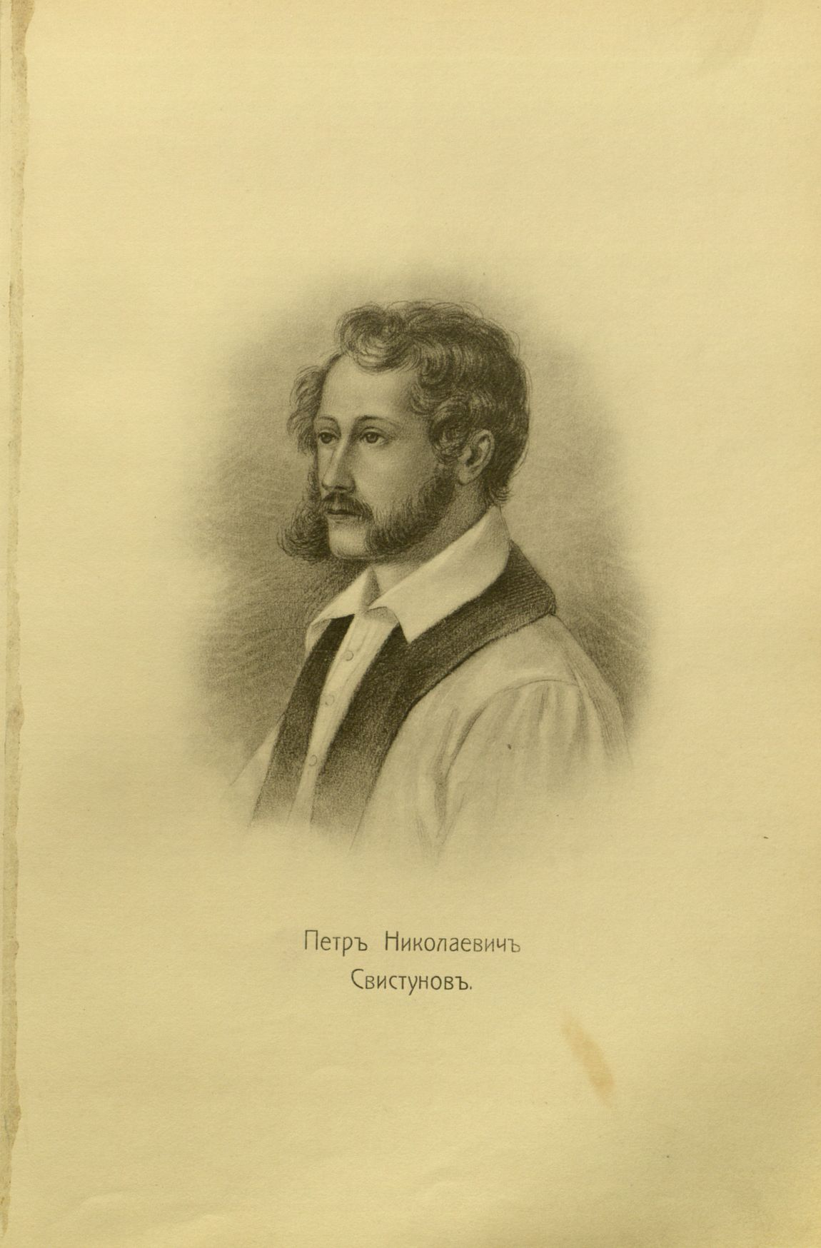 Petr Svistunov